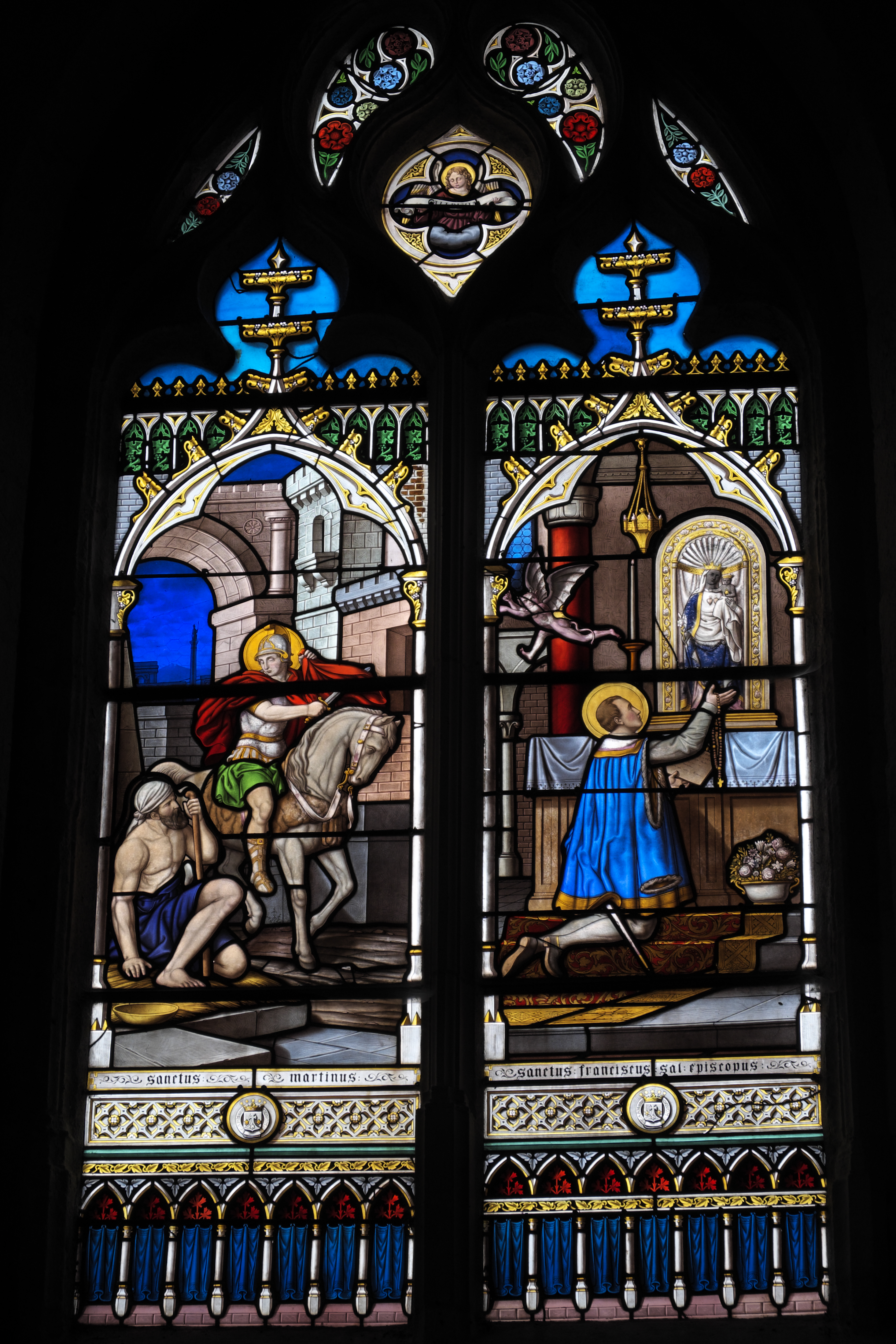 Kirche Saint-Cyr in Sargé-sur-Braye im Département Loir-et-Cher (Centre-Val de Loire/Frankreich), Bleiglasfenster mit der Signatur: CARMEL CENOM; Darstellung: Hl. Martin